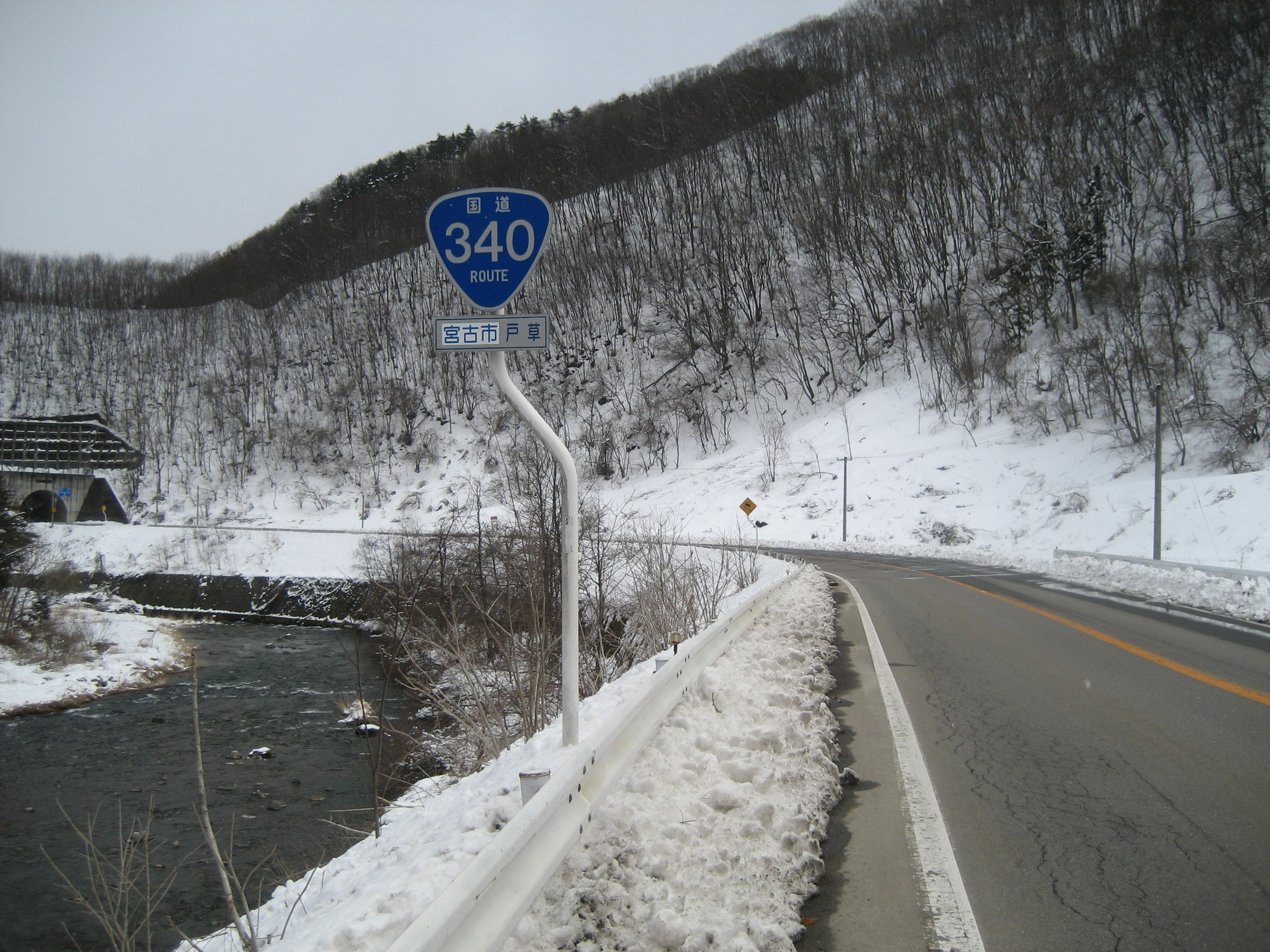 国道106号線岩手県宮古市戸草付近